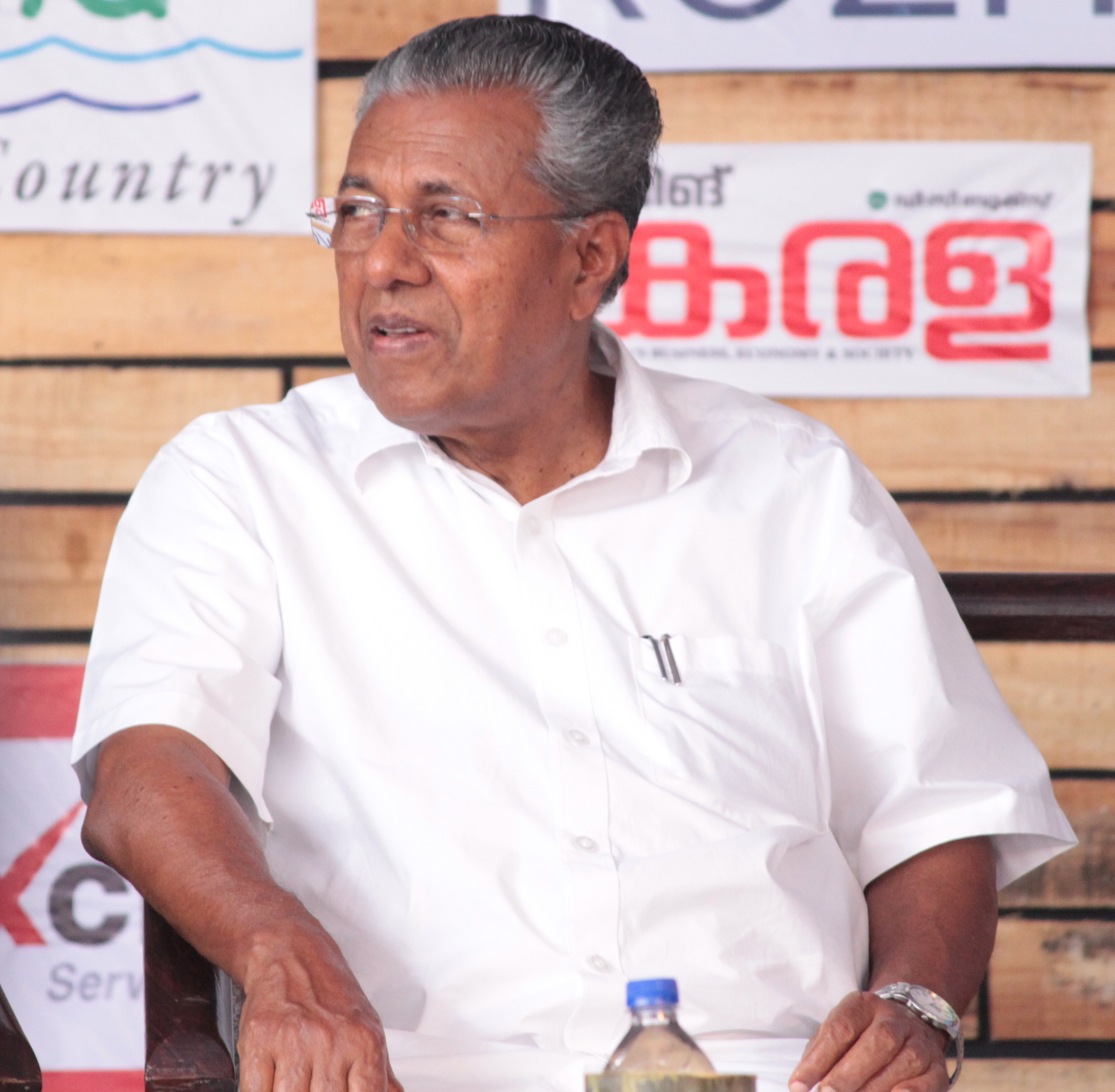 പിണറായി വിജയന്‍ കോഴിക്കോട് ലിറ്ററേച്ചര്‍ ഫെസ്റ്റിവലില്‍ (2017)